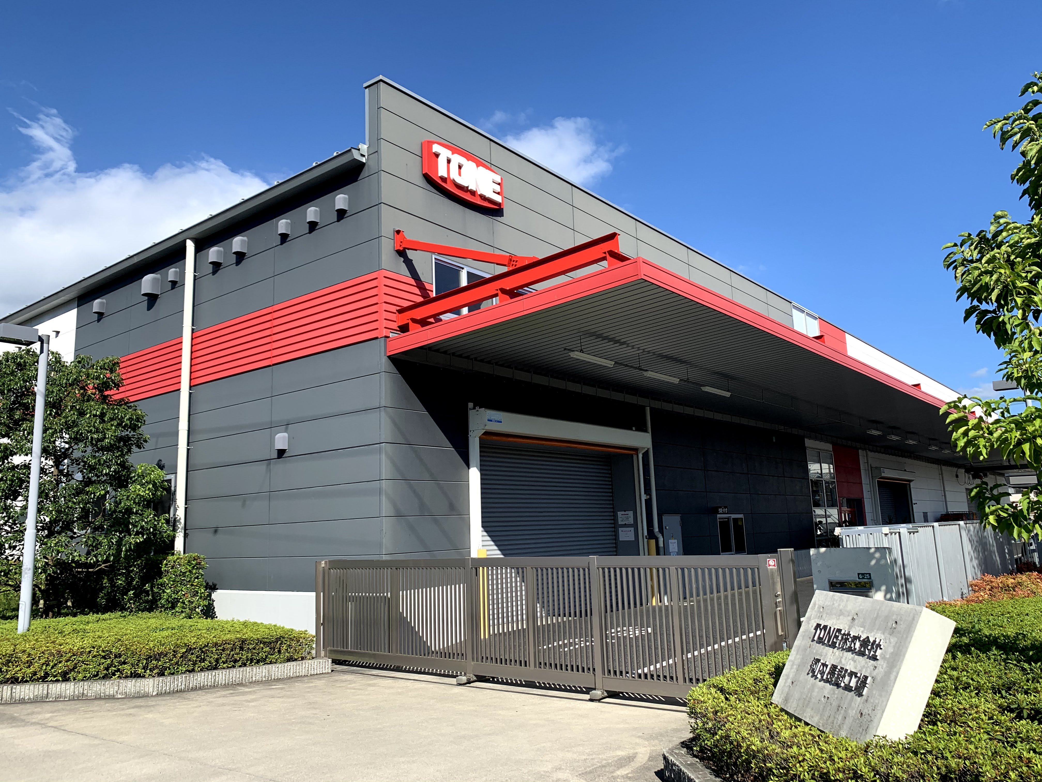 TONE株式会社 河内長野工場 外観